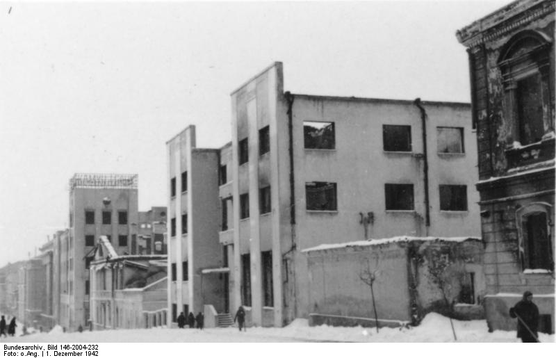 Wilna (Dienststelle) - Osmiana, Minsk 1. Dez. 1942 Kommandanturstrasse Einsatzstab Reichsleiter Rosenberg für die besetzten Gebiete - Hauptarbeitsgruppe Ostland Film: 48/35 Information added by Wikimedia users.Беларуская (тарашкевіца): Вуліца Карла Маркса. Менск, БССР. Сьнежань 1942 году.